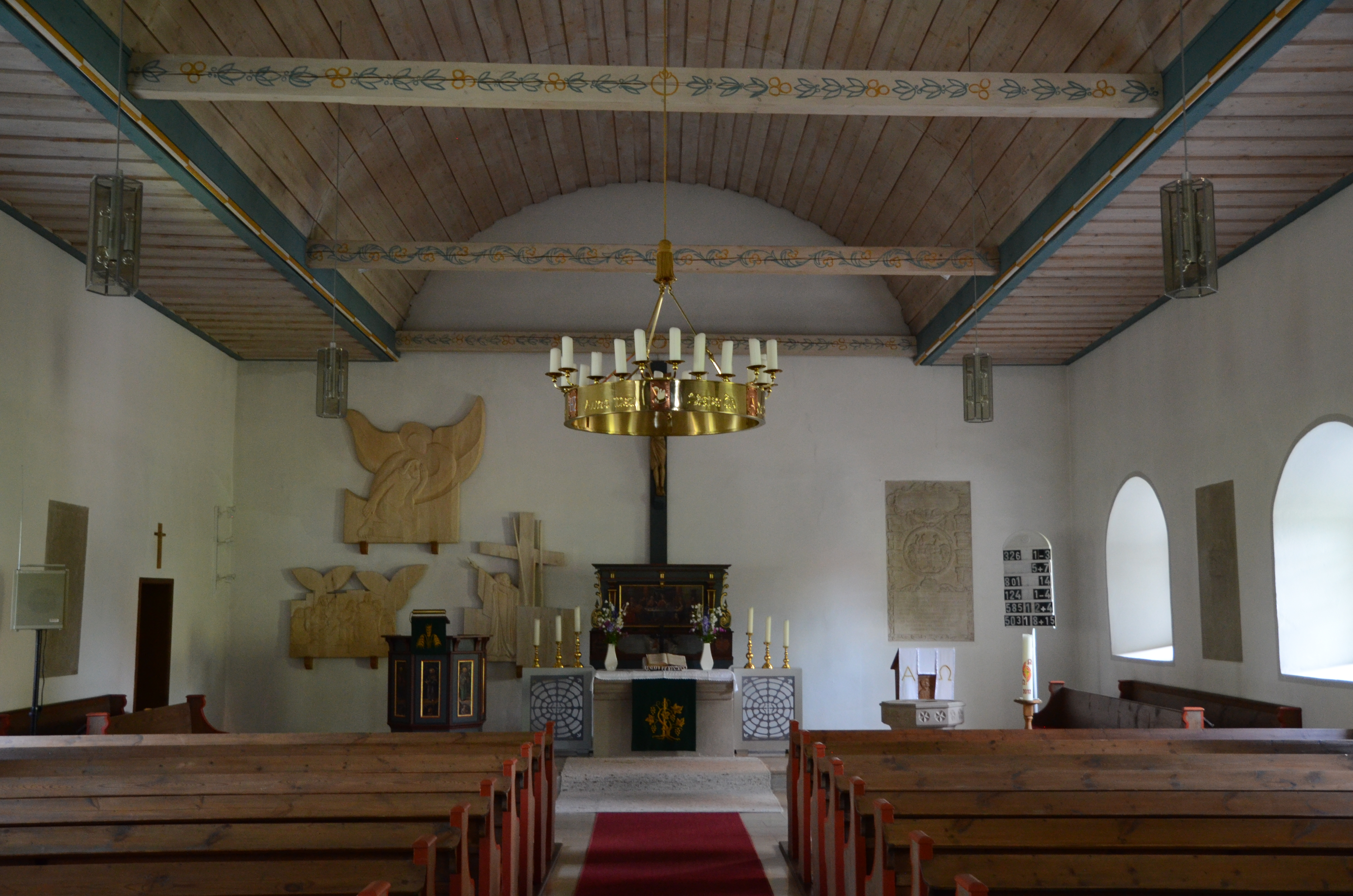 neue Schlosskirche in Sommersdorf, ehemals Zehnstadel